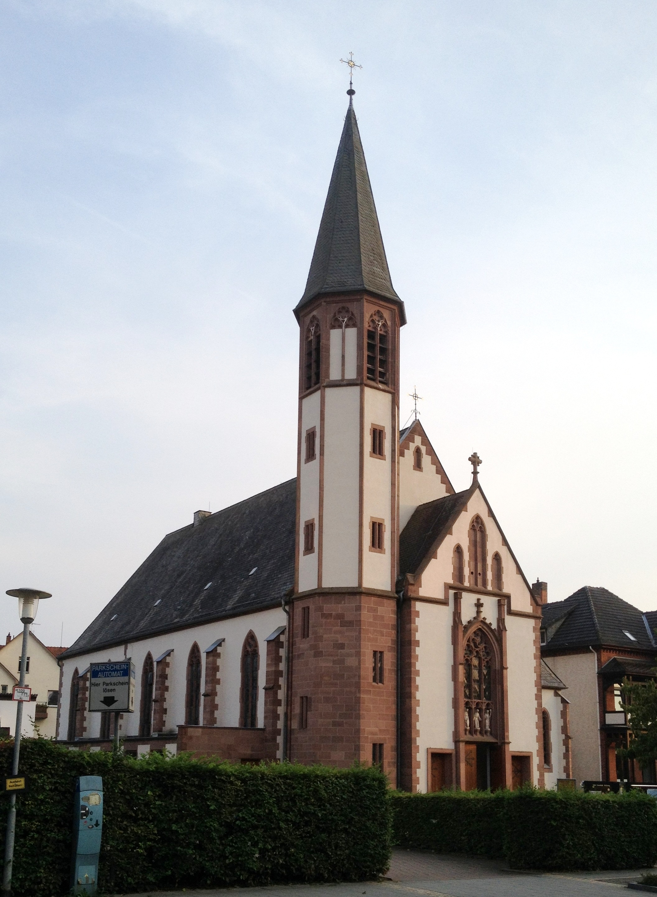 Bad Pyrmont, kath. Kirche St. Georg